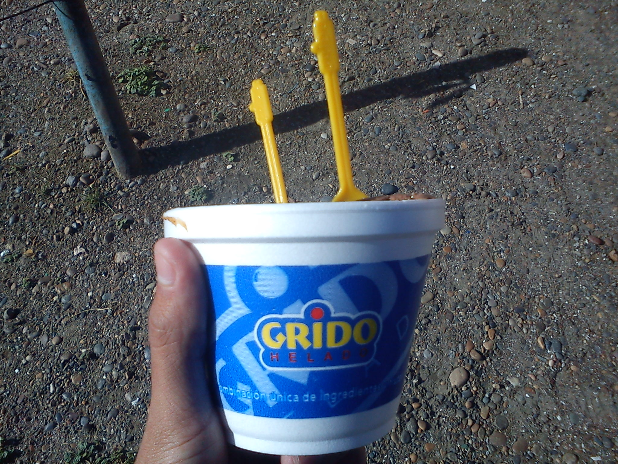 Pote de 250 g de Grido Helado